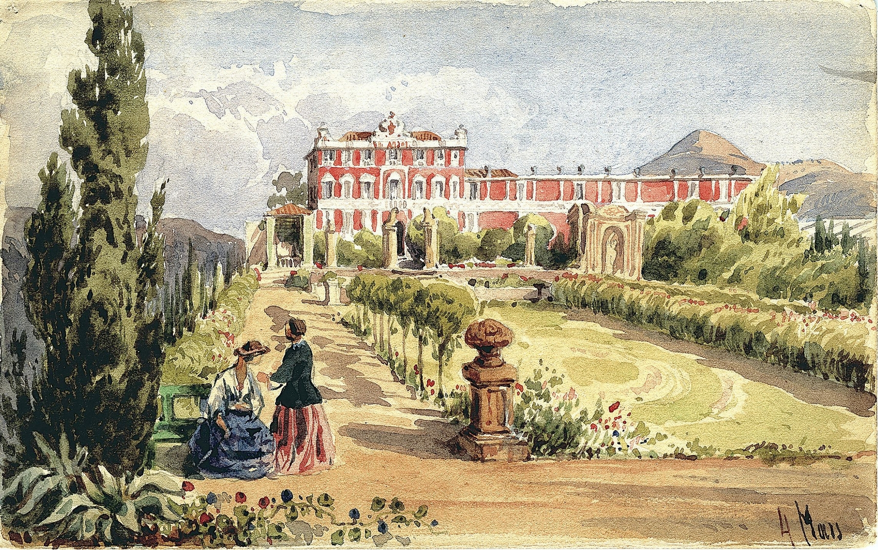 Aquarelle de Garin de Cocconato (Bibliothèque du Chevalier de Cessole, Nice)